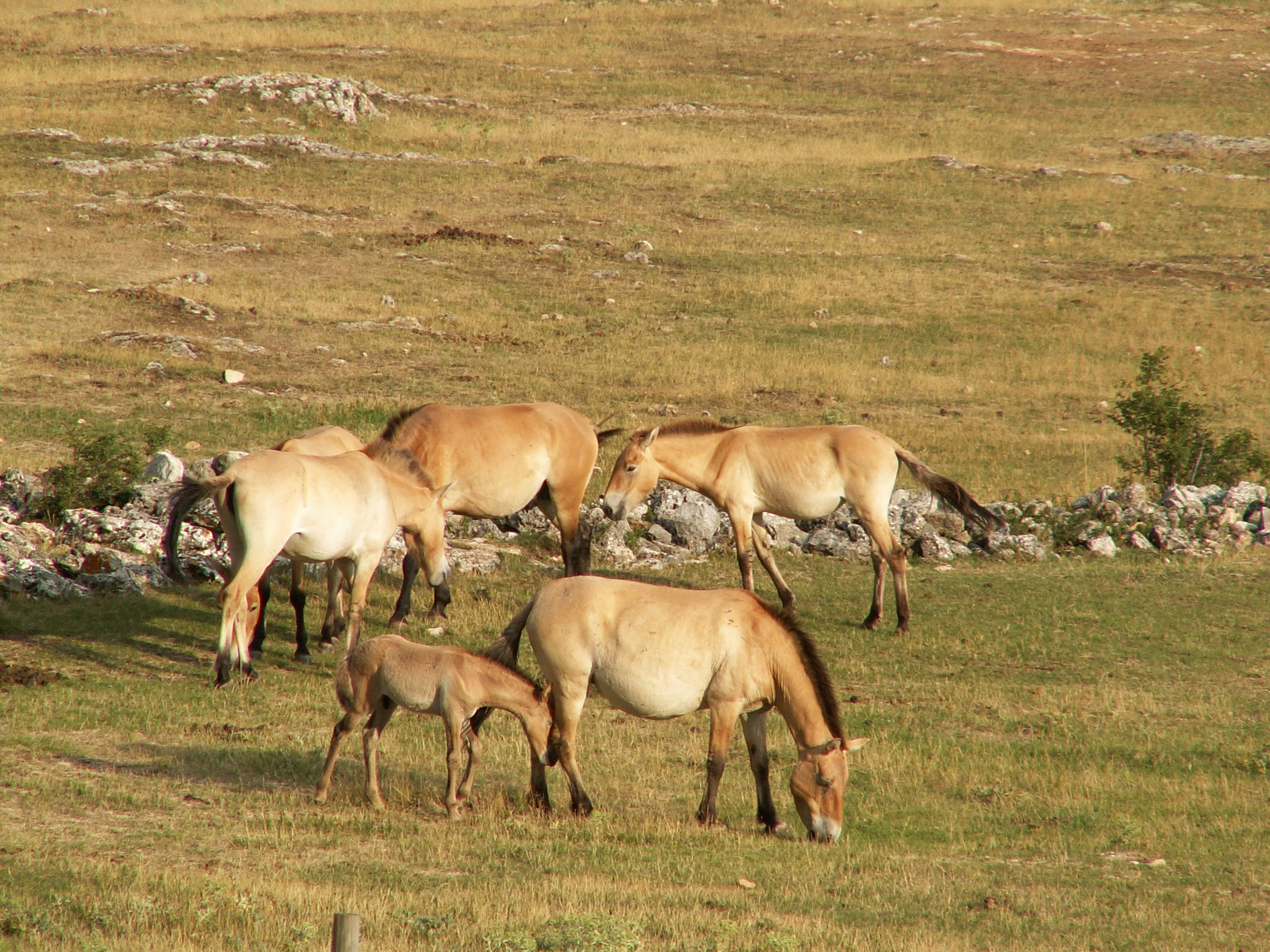 Przewalski's Horse (Equus ferus przewalskii or Equus caballus przewalskii).